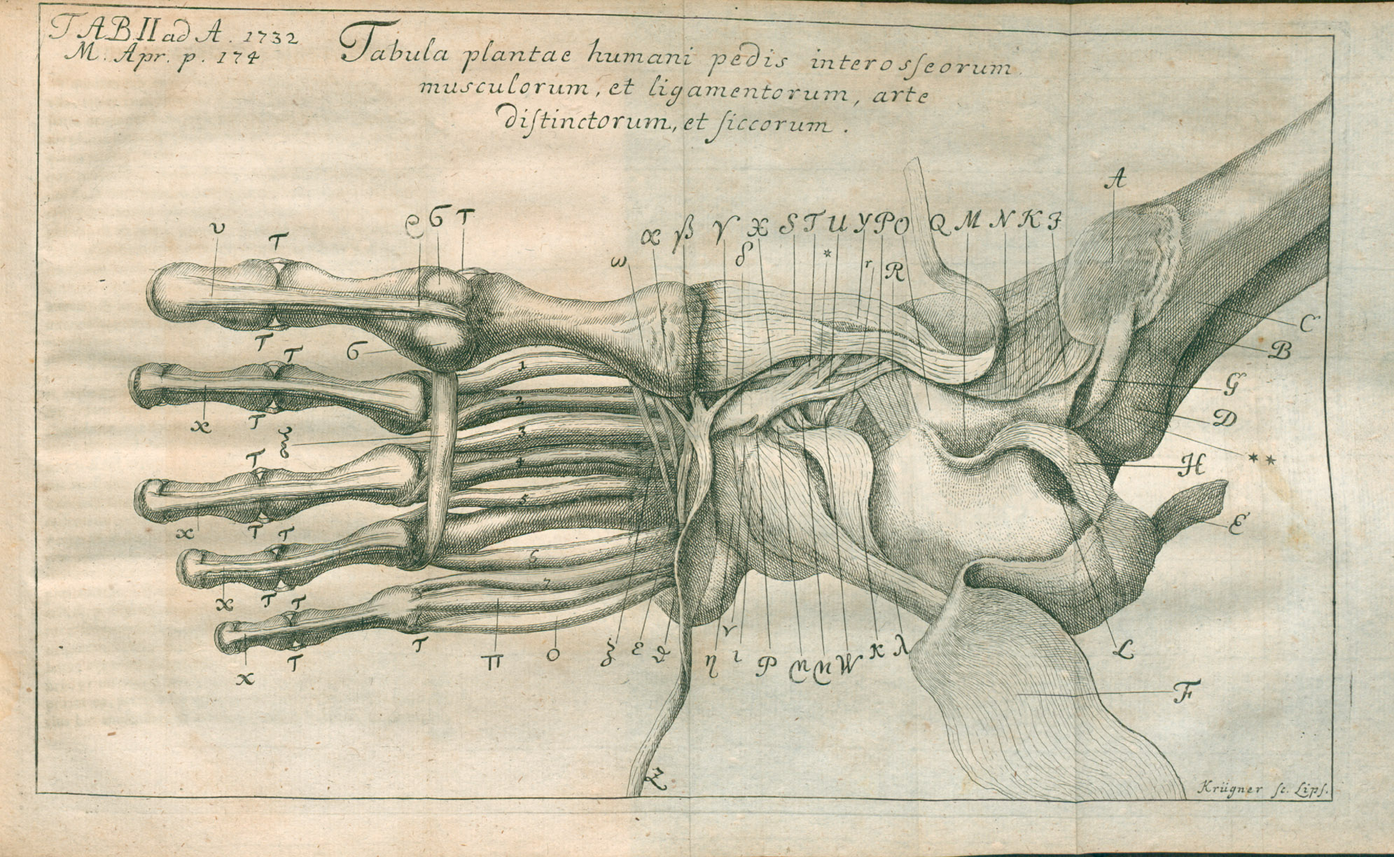 Illustration